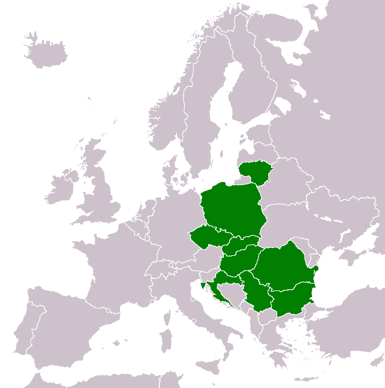 CBA in Europe